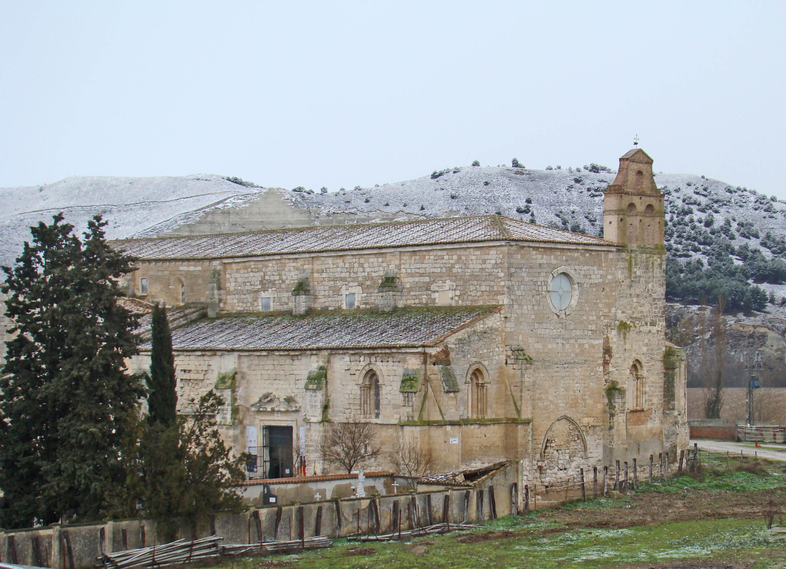 Monasterio de Palazuelos en la provincia de Valladolid. Vista del monasterio desde la carretera de acceso viniendo de Cabezón, en un día con nieve.